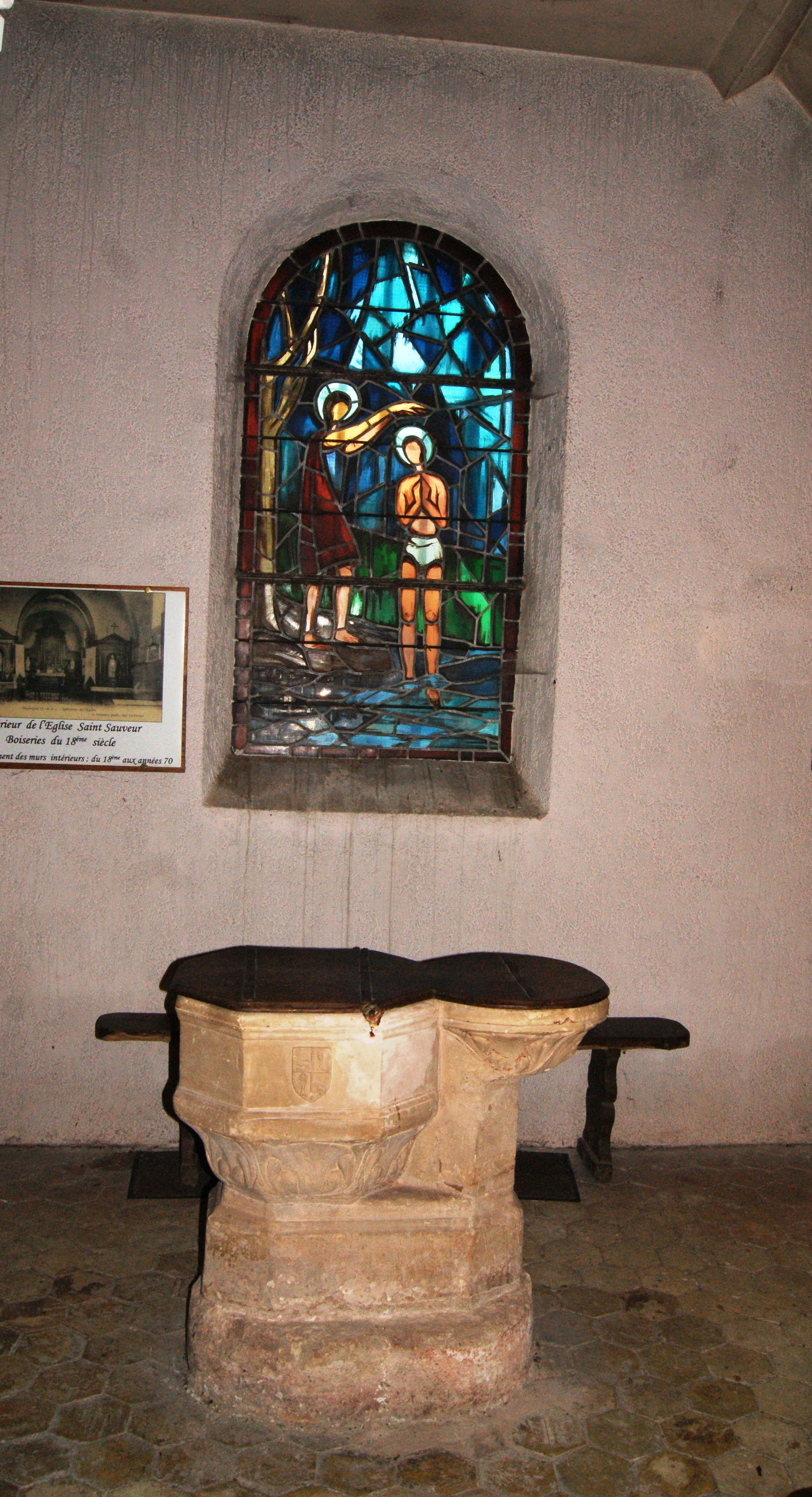 Église Saint-Sauveur de Maurepas - Vase baptismale